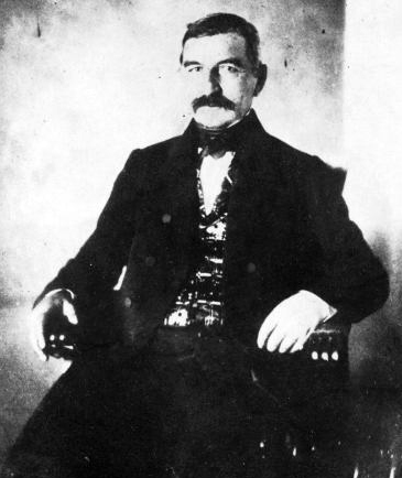 Aleksa Simić fut trois fois premier ministre de Serbie